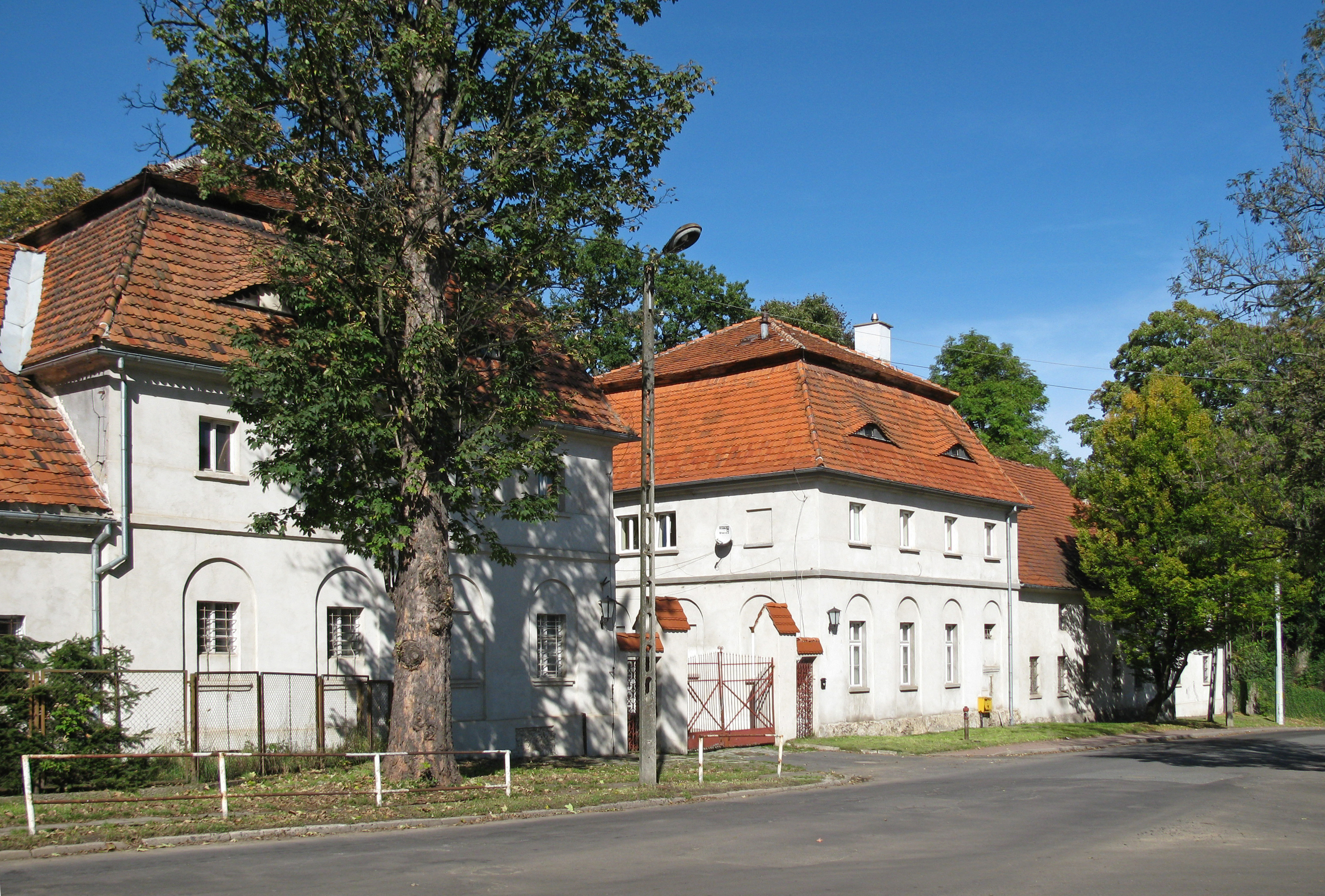 Wałbrzych Rusinowa, ul. Bystrzycka 3 - zespół pałacowy, 1720-1730